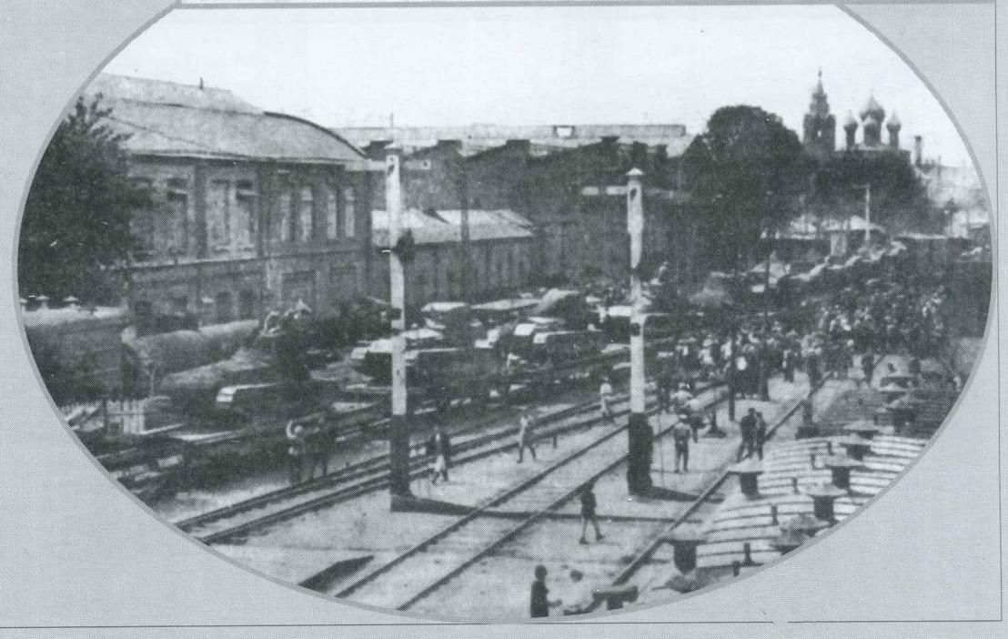 Ростов-на-Дону. Добровольческая армия на вокзале.1919